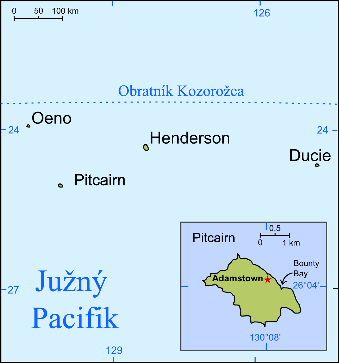 Pitcairnove ostrovyEsperanto: mapo de la Pitkarna Insularo el la Monda Faktlibro de CIA, priskribo en la slovaka